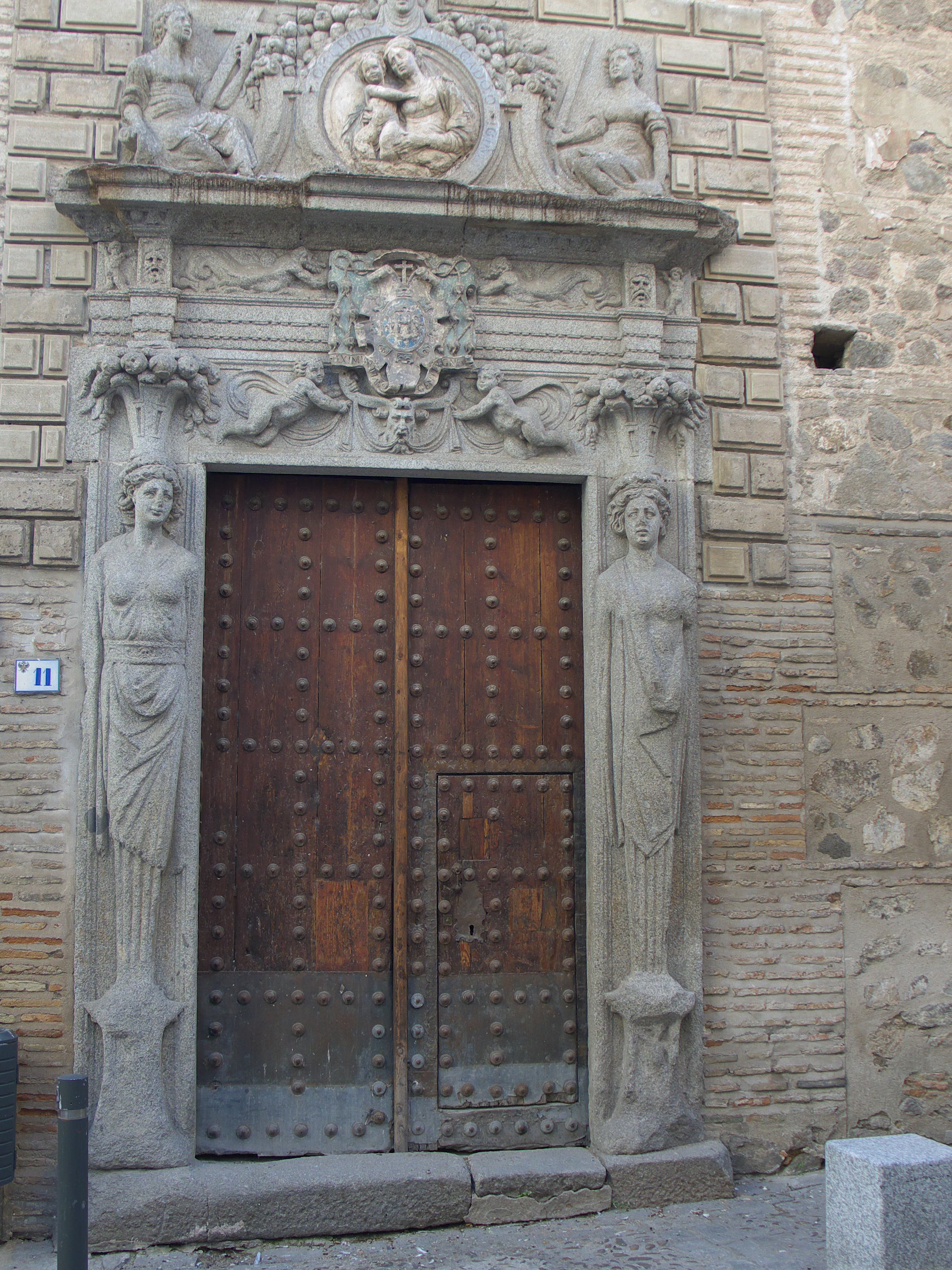 Renacimiento toledano. Portada plateresca (1555) del arquitecto, escultor y rejero Francisco de Villalpando.